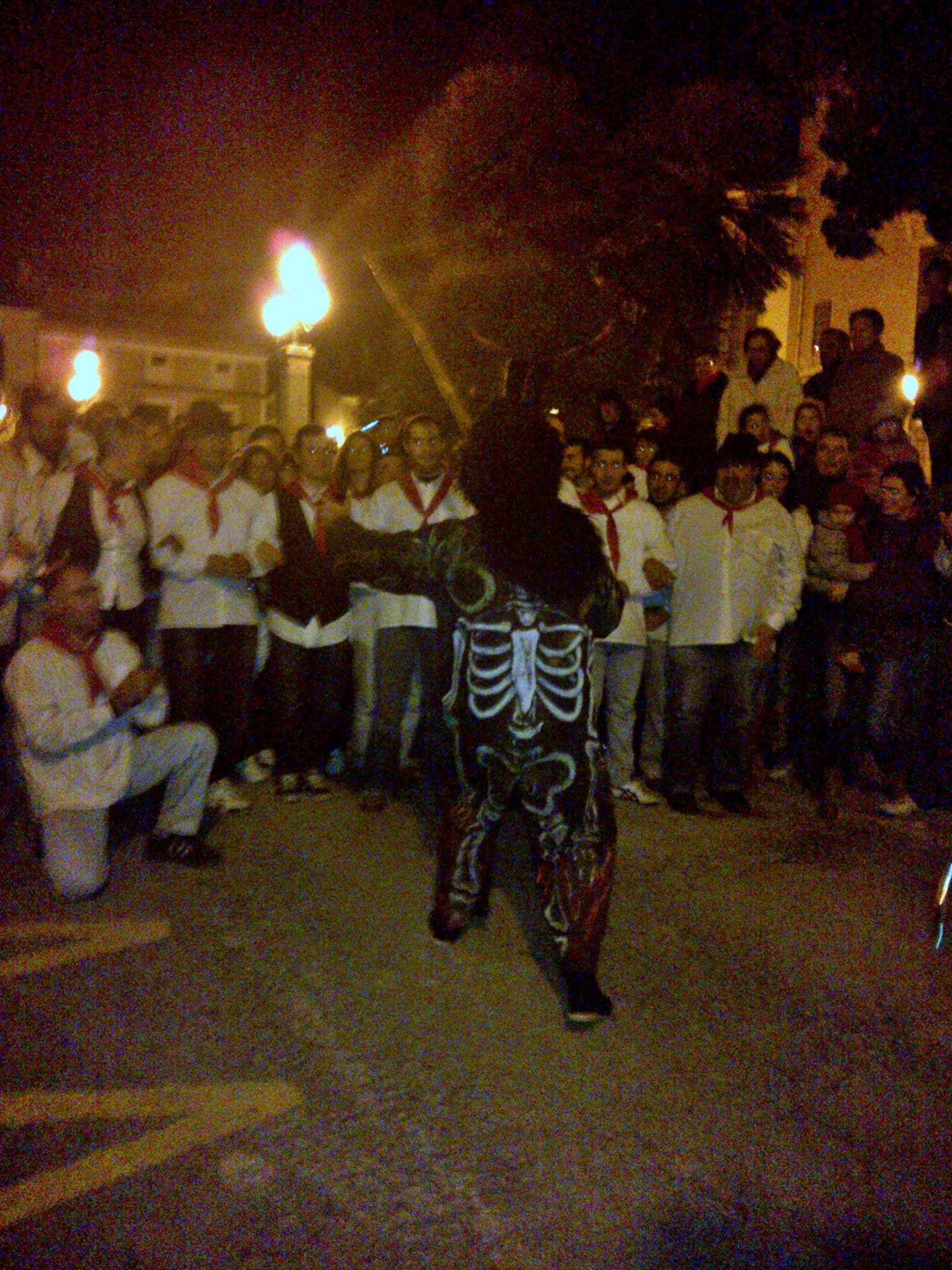 Dimoni petit d'Artà d'esquena a les Completes, el vespre del 16 de gener a la festa de Sant Antoni